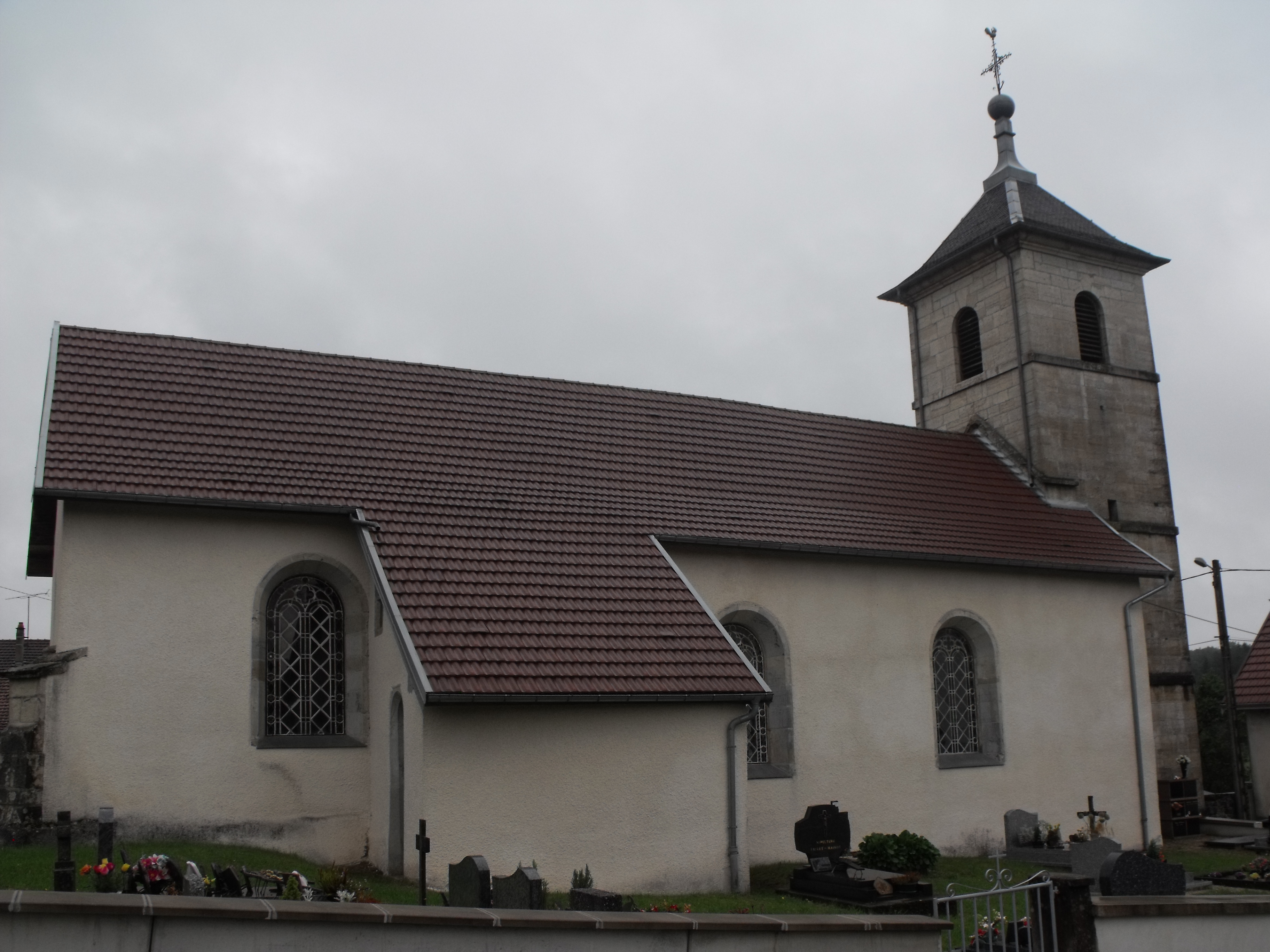 Eglise de Provenchère, Doubs, France